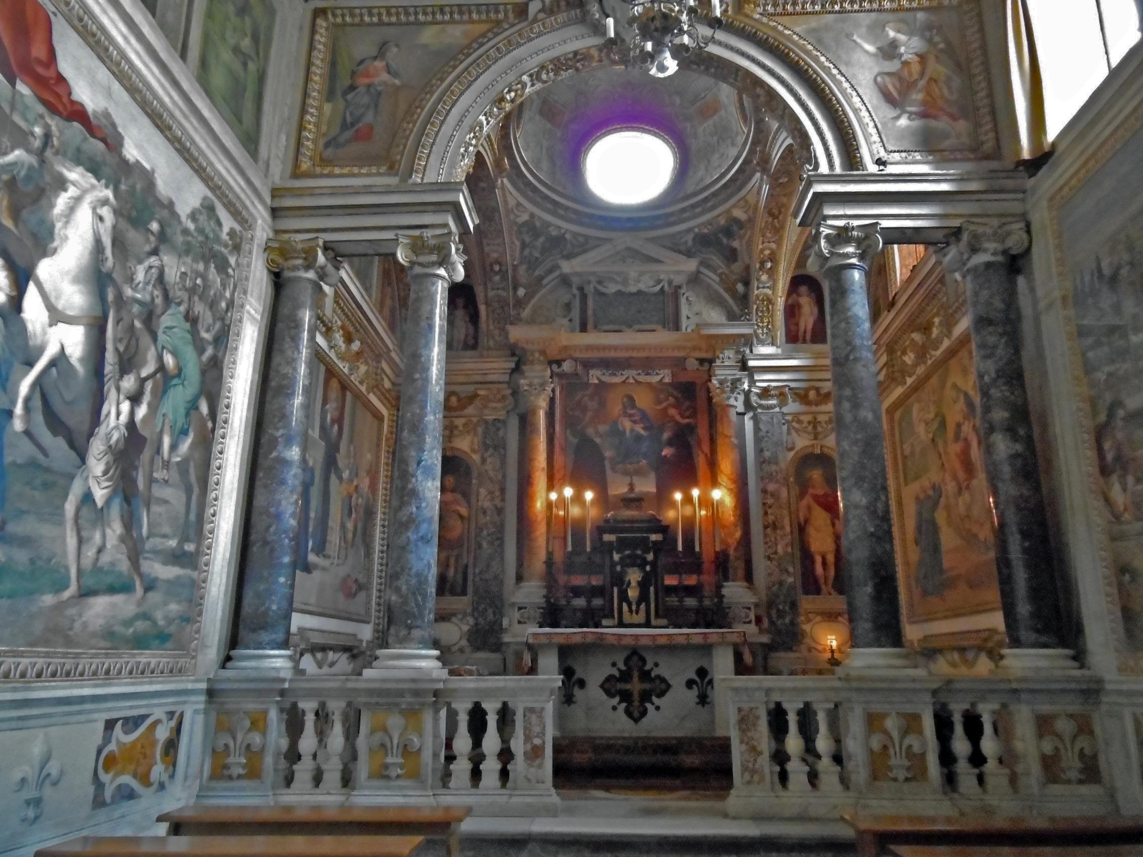 Italia, Lazio, provincia di Roma, Grottaferrata, abbazia territoriale di Santa Maria (abbazia di San Nilo), chiesa abbaziale, cappella dei Santi Nilo e Bartolomeo (fondatori dell'abbazia) o cappella farnesiana